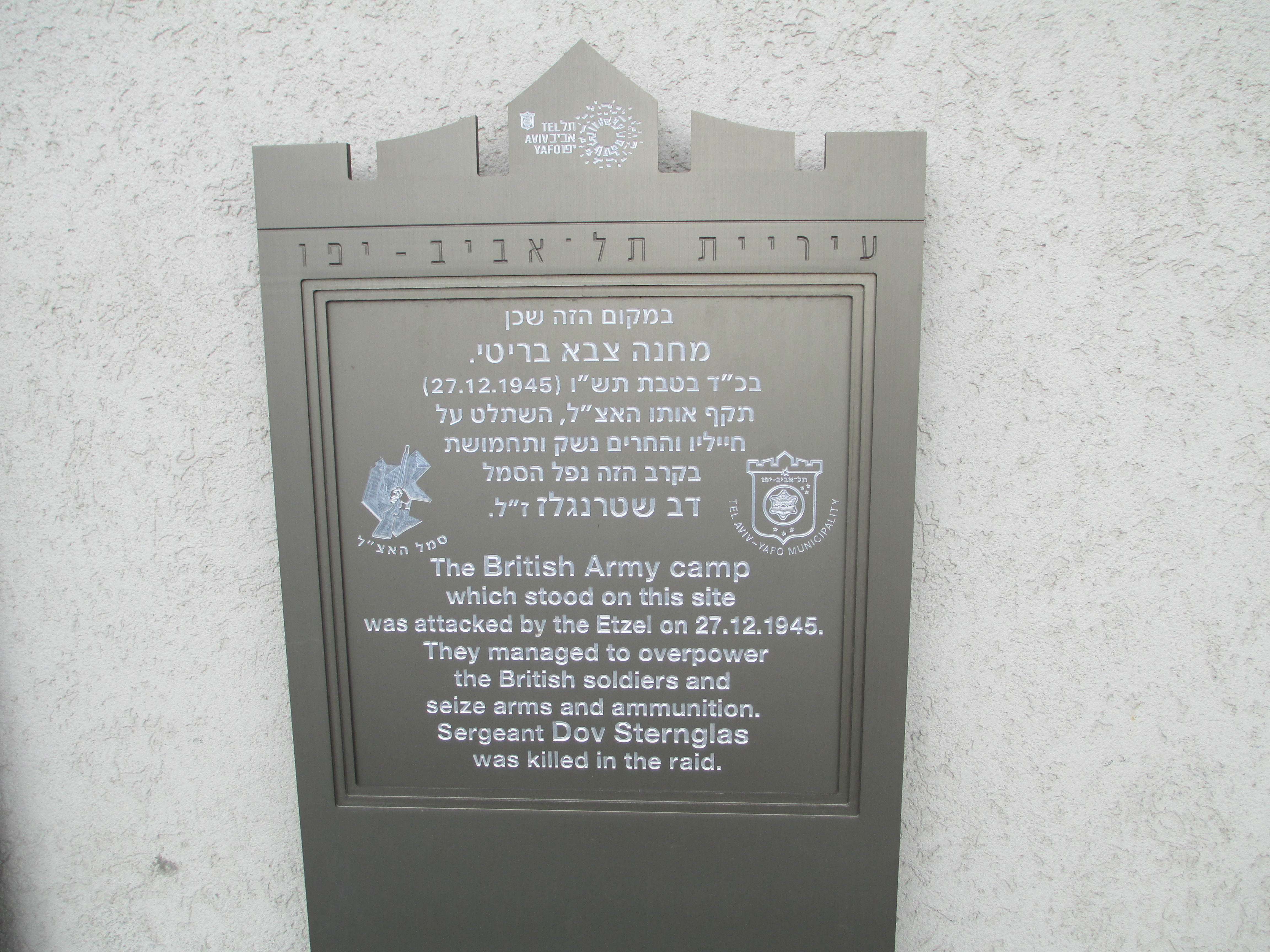 שלט הנצחה לפעולת אצ"ל ביריד המזרח